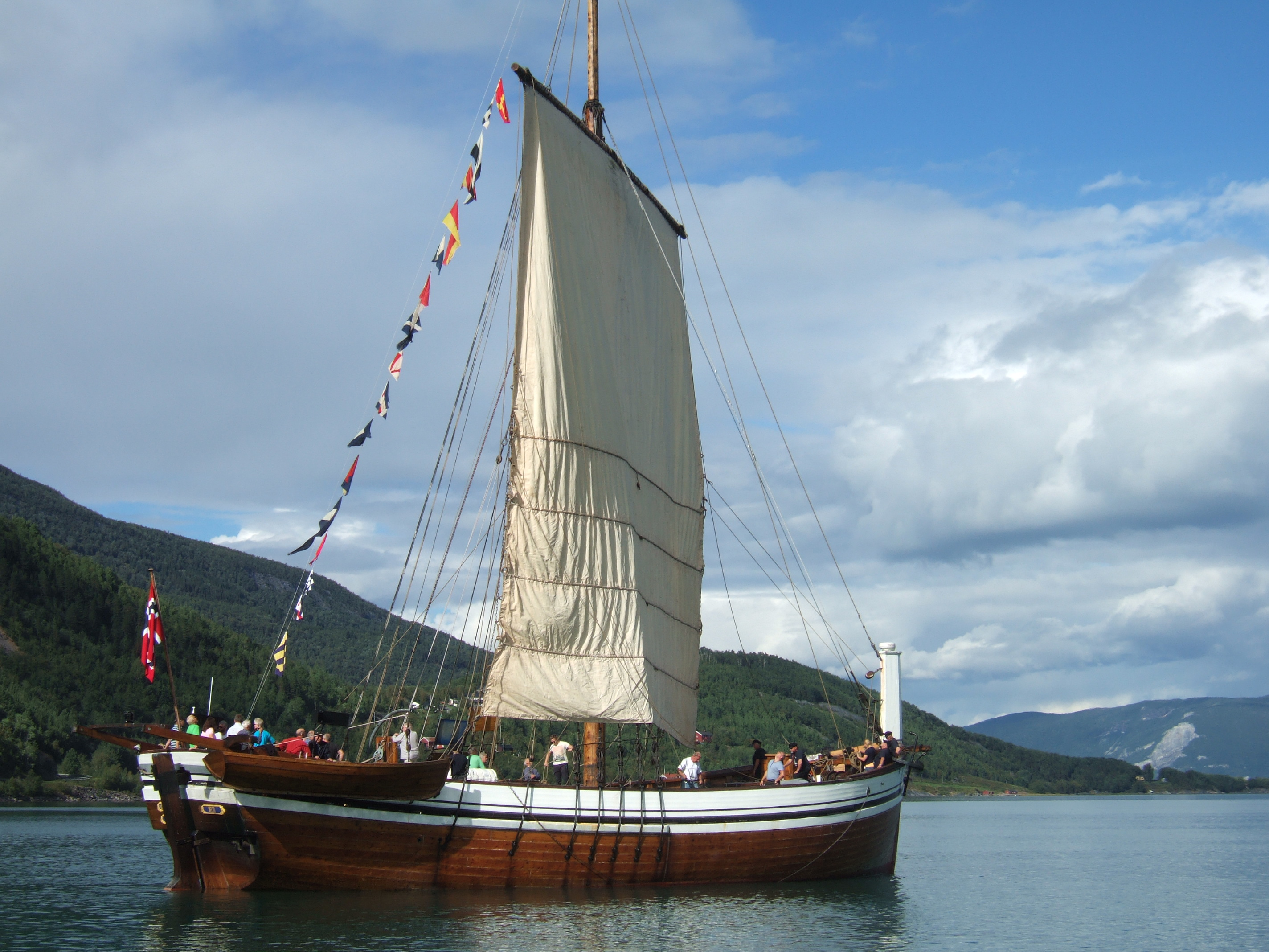 Nordlandsjekta Brødrene fra Melbu i Vesterålen på besøk i Rognan i Saltdal kommune i anledning Rognandagan 2014.